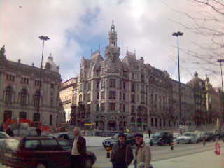 O Porto (Portugal)